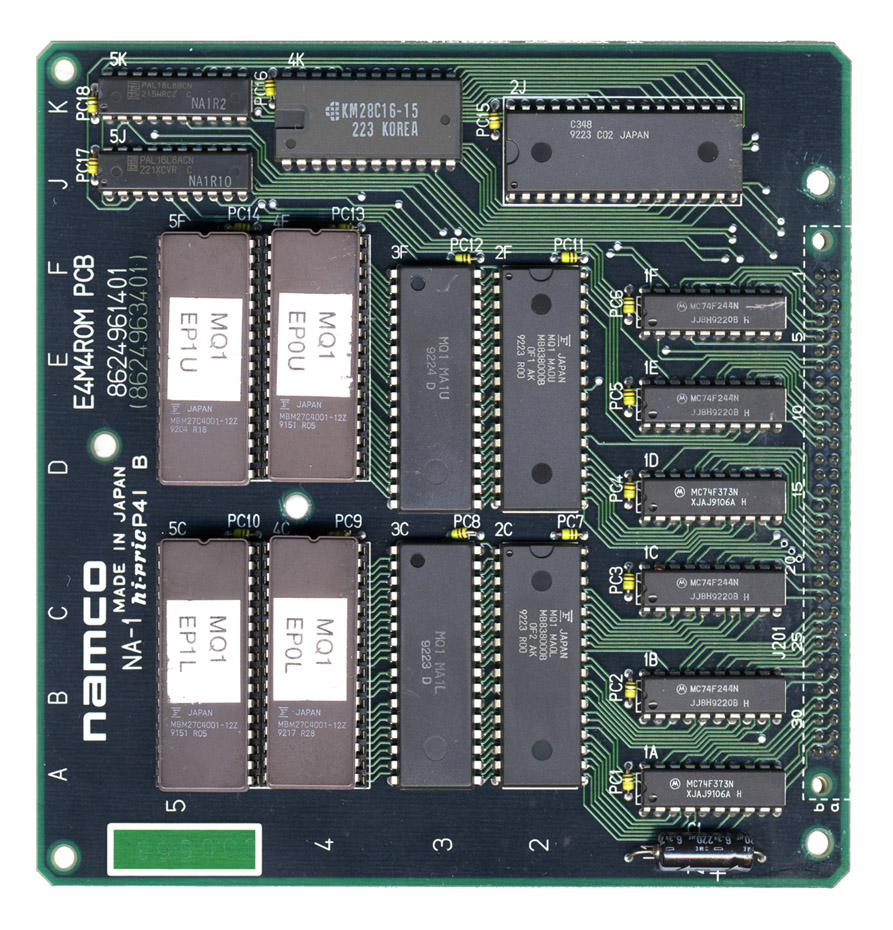 ARCADE GAME PCB NAMCO NA-1 E4M4ROM PCB 基板形番：8624961401 （シルク記載形番） 基板形番：8624963401 （エッチング文字形番）